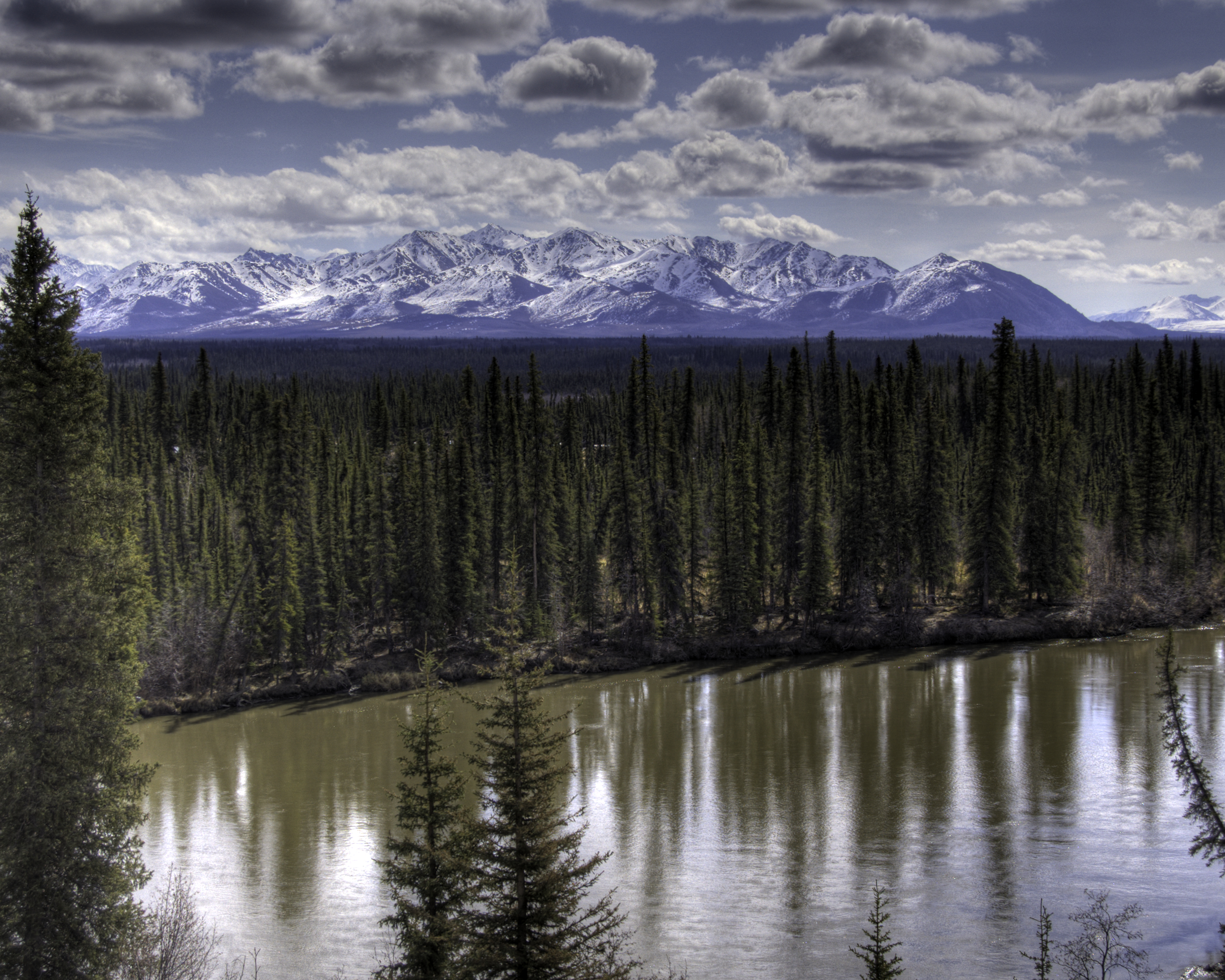 Alaska